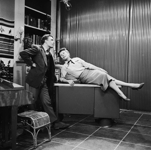 Mary Dresselhuys in aflevering 3: Franse slag, van de Nederlandse televisieserie Pension Hommeles in 1957